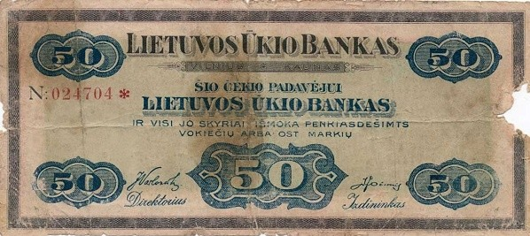 50 остмарок (ауксинасов) выпуска 1919-1920 годов